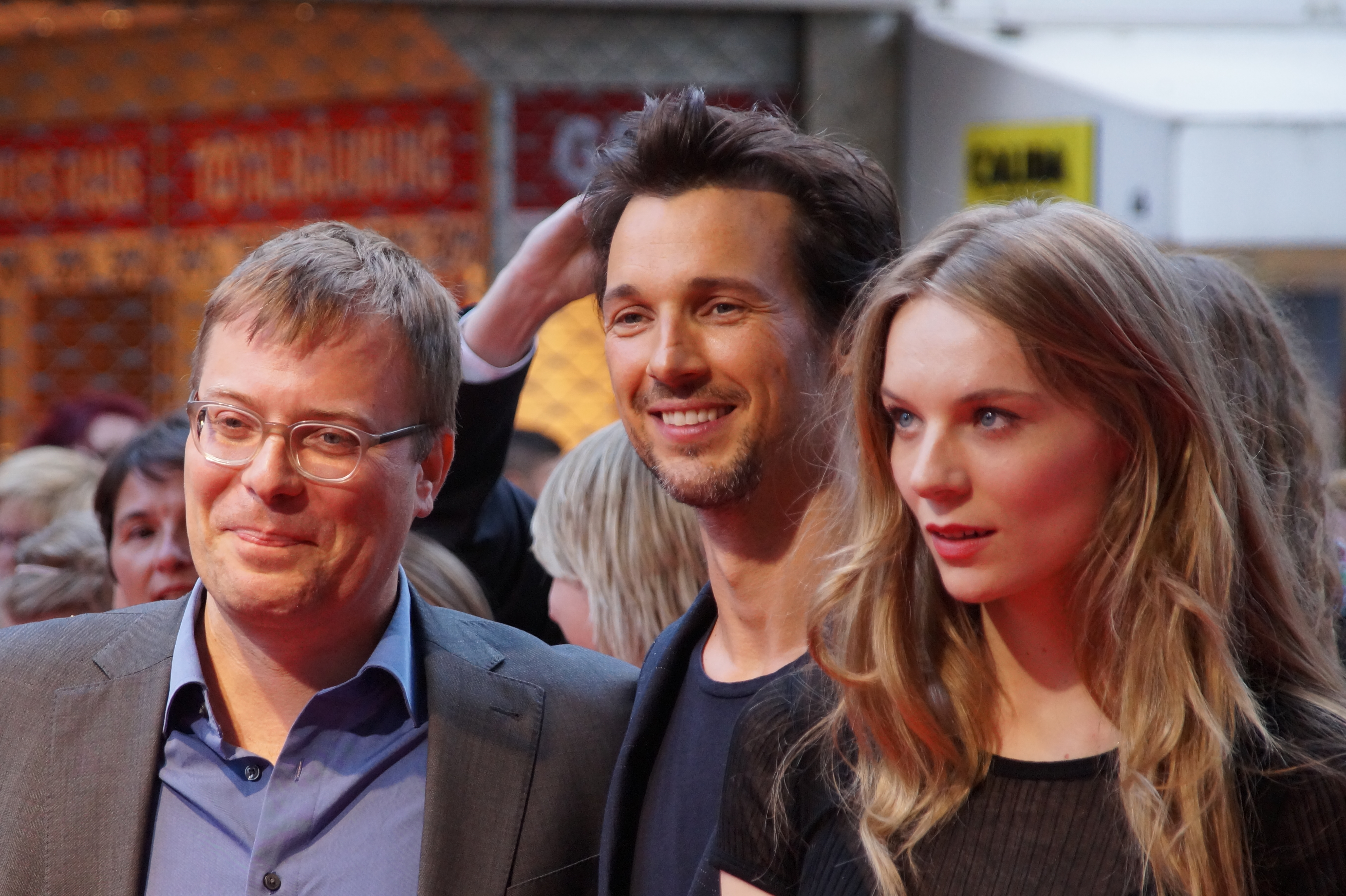 Deutschlandpremiere von "Die Lügen der Sieger - The Lies of the Victors" in der Lichtburg Essen am 08.06.2015.